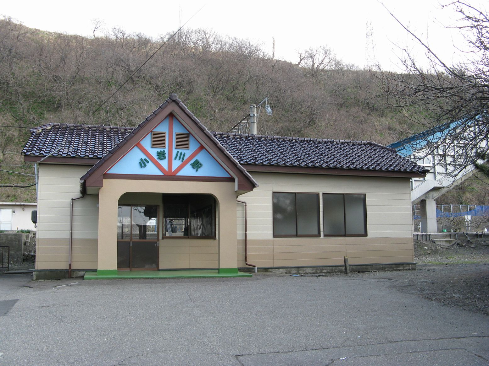 Koiwagawa Station, Tsuruoka, Yamagata, Japan